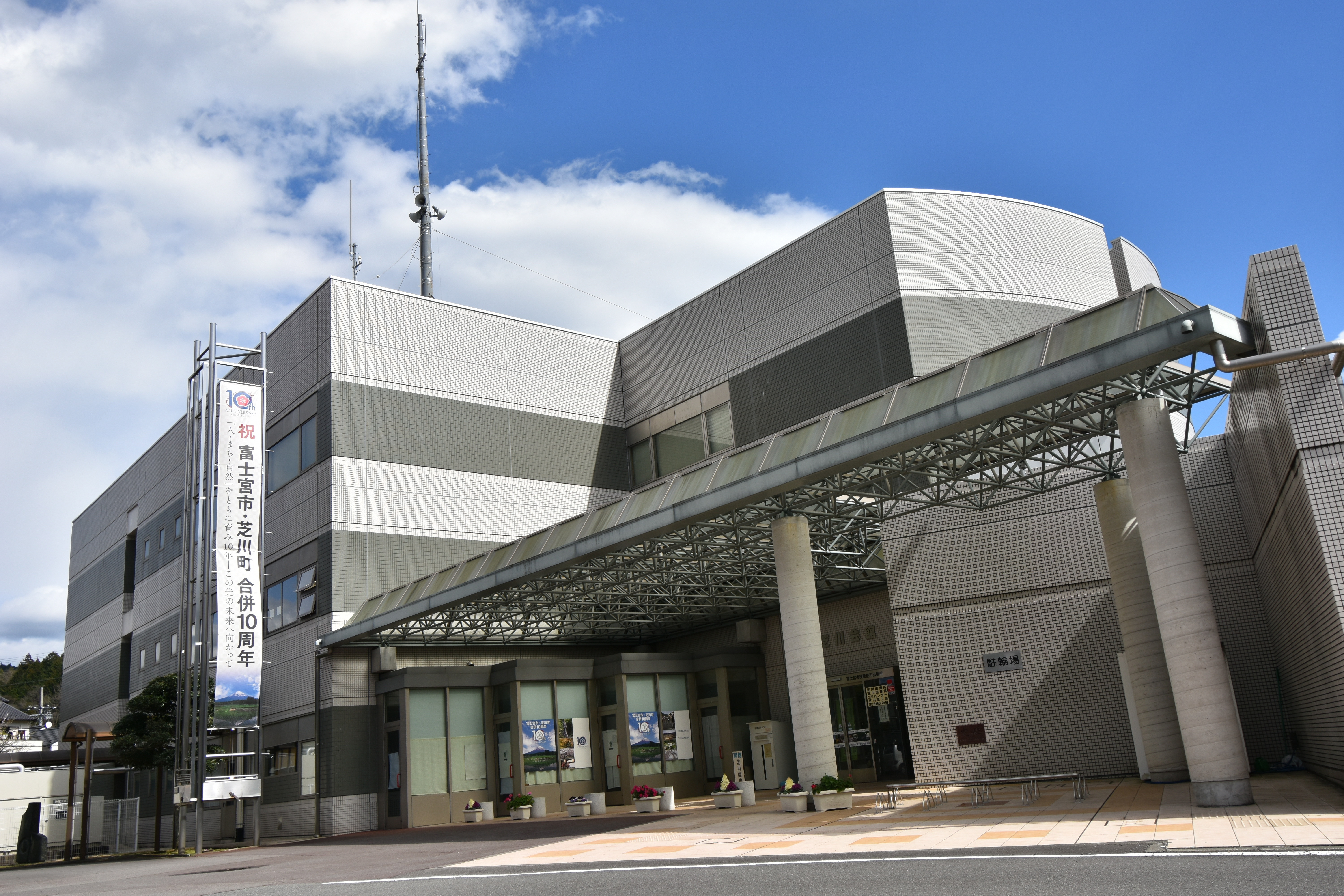 「富士宮市立芝川図書館」兼「富士宮市役所芝川出張所」の外観（2020年3月15日撮影）